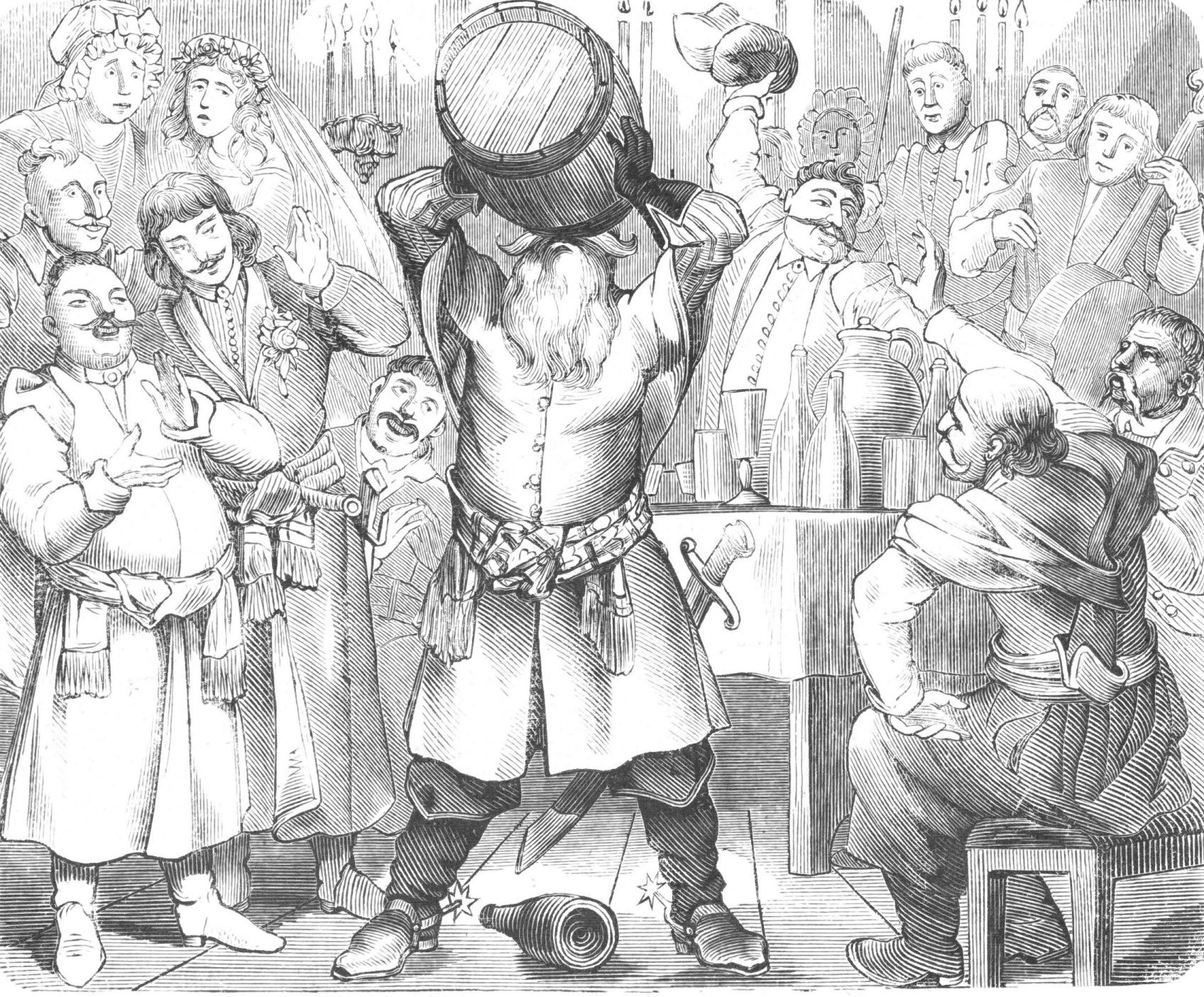 Diabeł Boruta. Drzeworyt z Tygodnika ilustrowanego wg pomysłu Juliusza Kossaka rytował H. Kubler